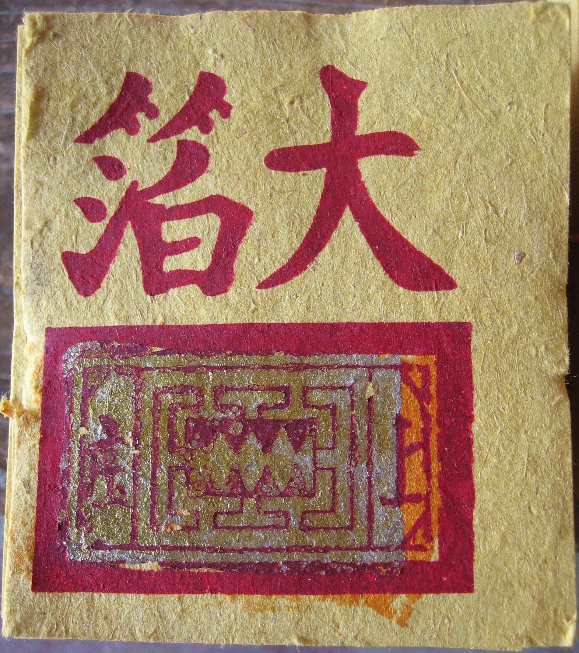 九金，南臺灣民眾祭拜地基主所用的紙錢